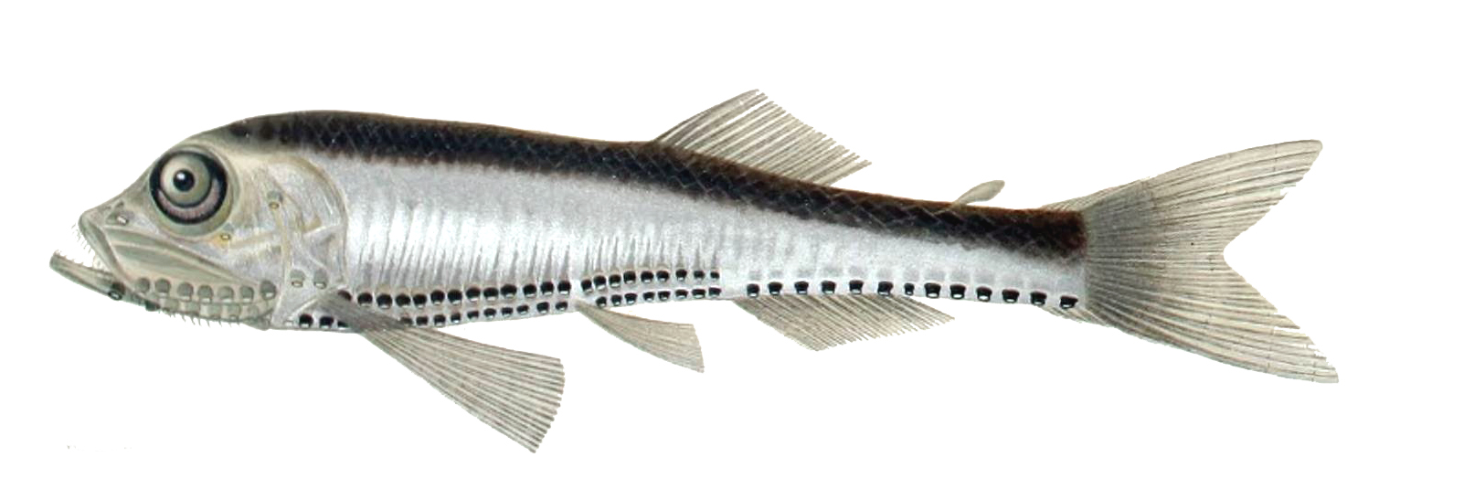 Vinciguerria attenuata ?Vinciguerria lucetia in the original source.